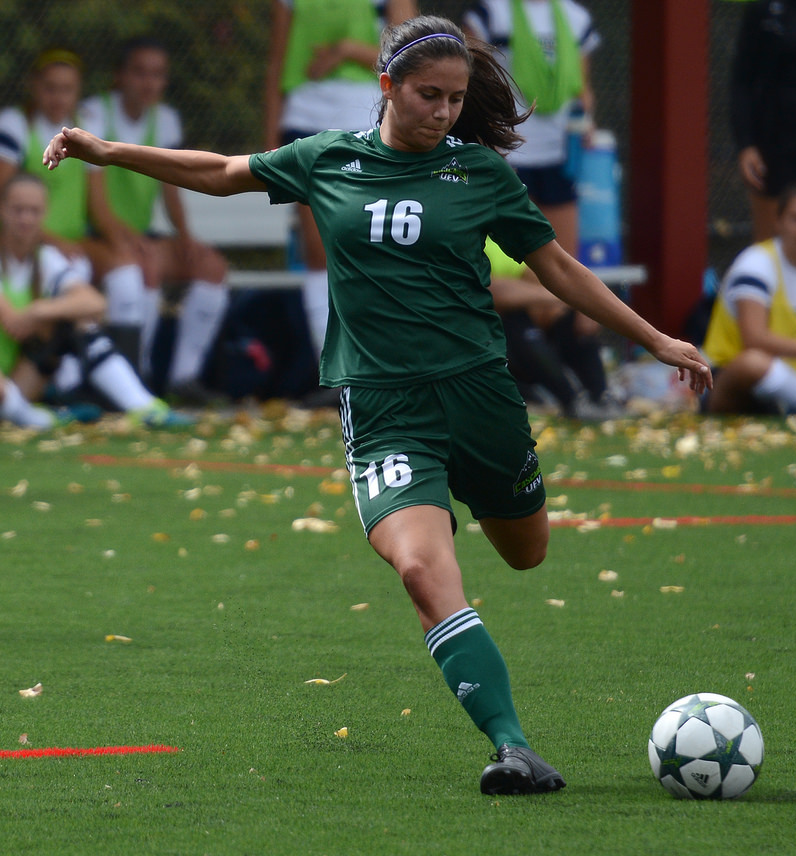 29197436191_f8762f0774_k